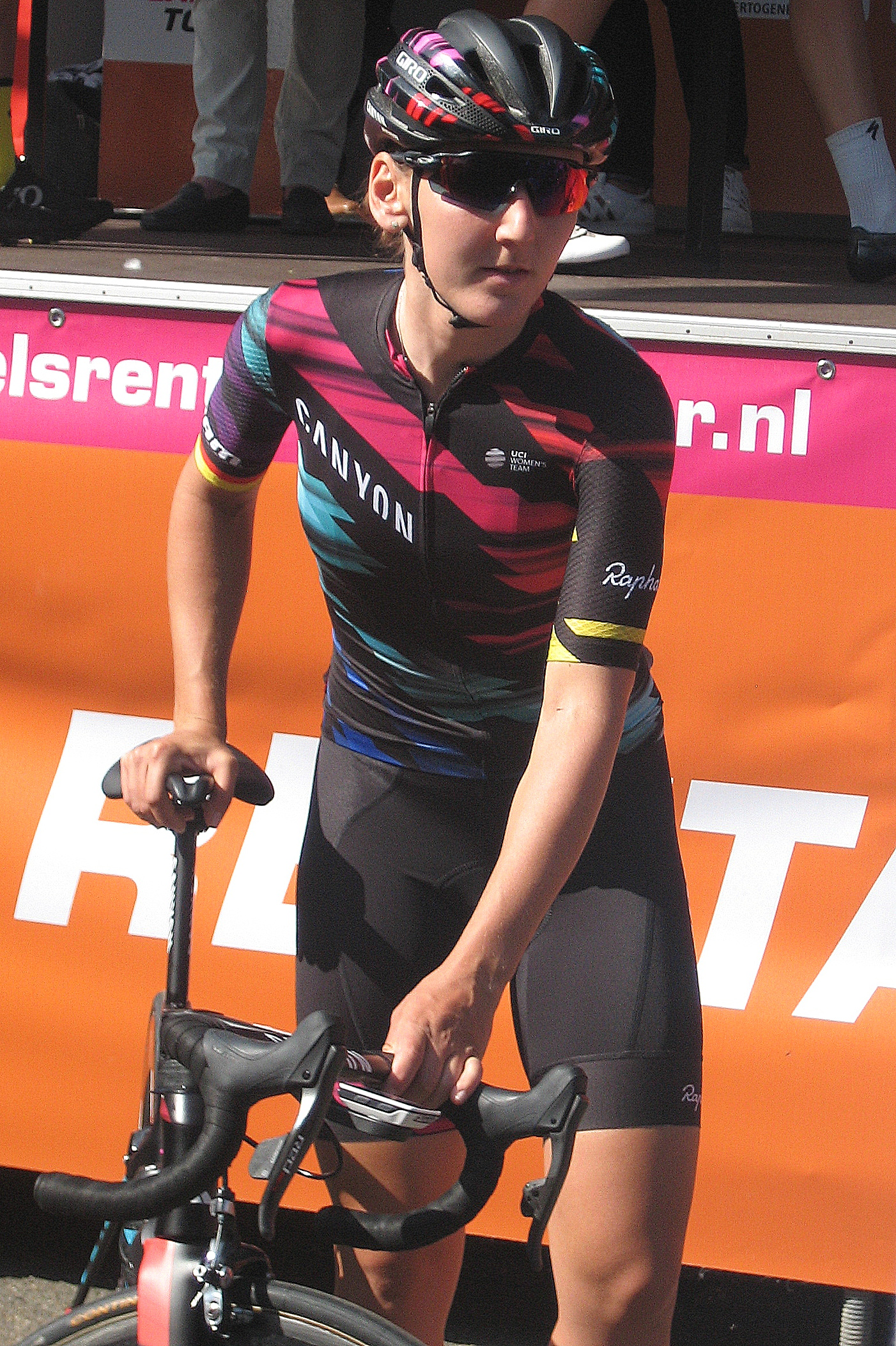 Lisa Brennauer (Canyon-SRAM) voor start 3e etappe Holland Ladies Tour 2016